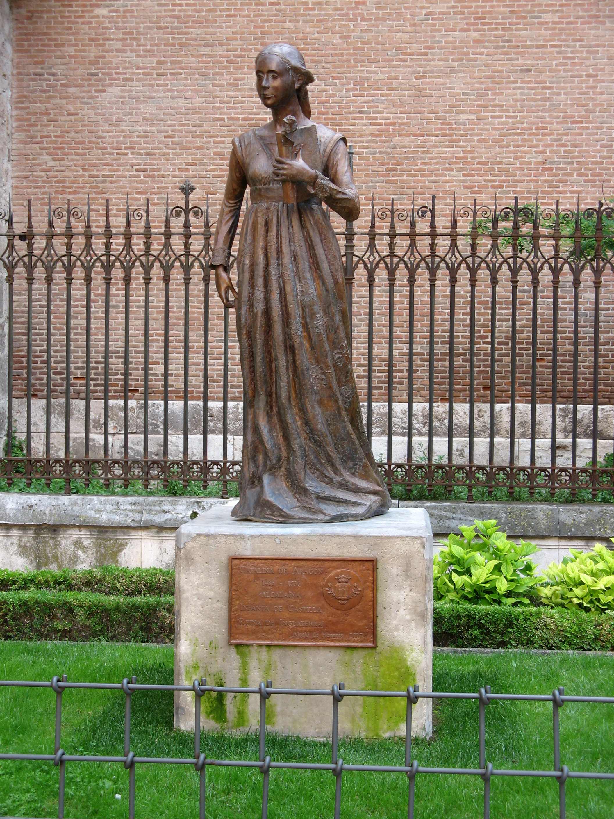 Catalina de Aragón 1485-1536 Alcalaína Infanta de Castilla Reina de Inglaterra Alcalá de Henares 2007 España